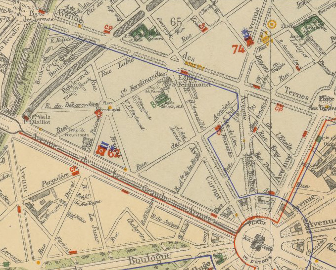 extrait du Plan cadastral de la ville de Paris... / établi d'après les documents officiels les plus récentes et comprenant l'Exposition universelle de 1900, par Mme Max Mabyre